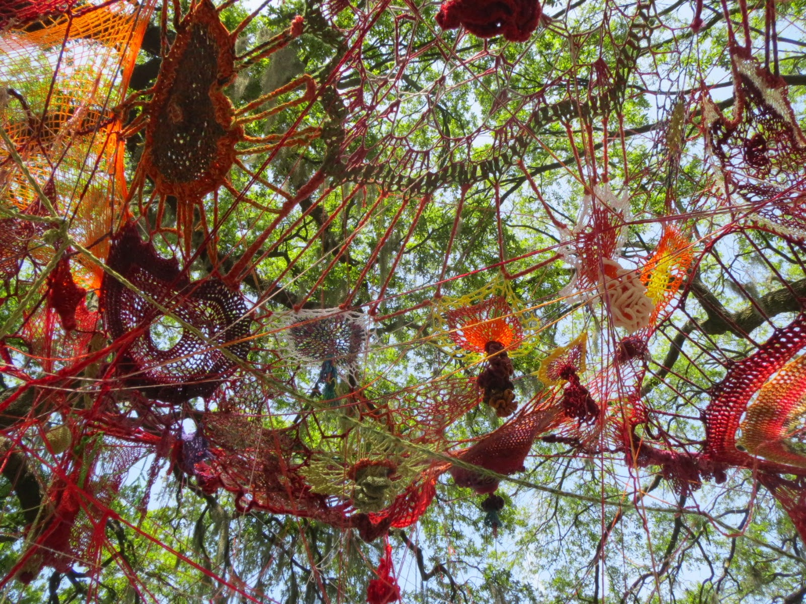 Yarn Bombing